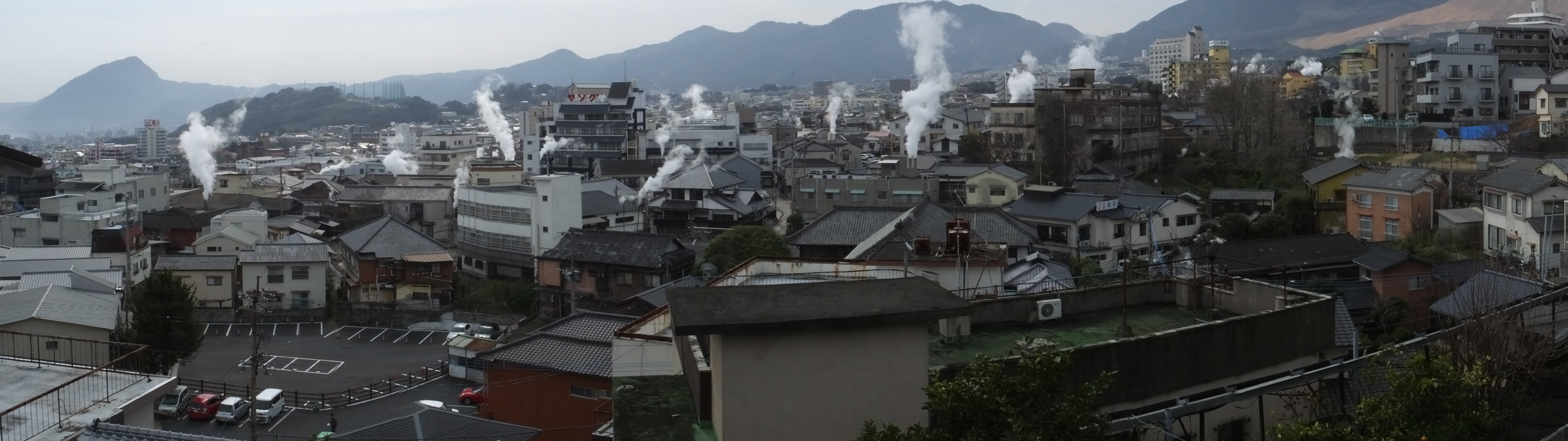 2020-02-24 Kannawa Onsen 鉄輪温泉全景